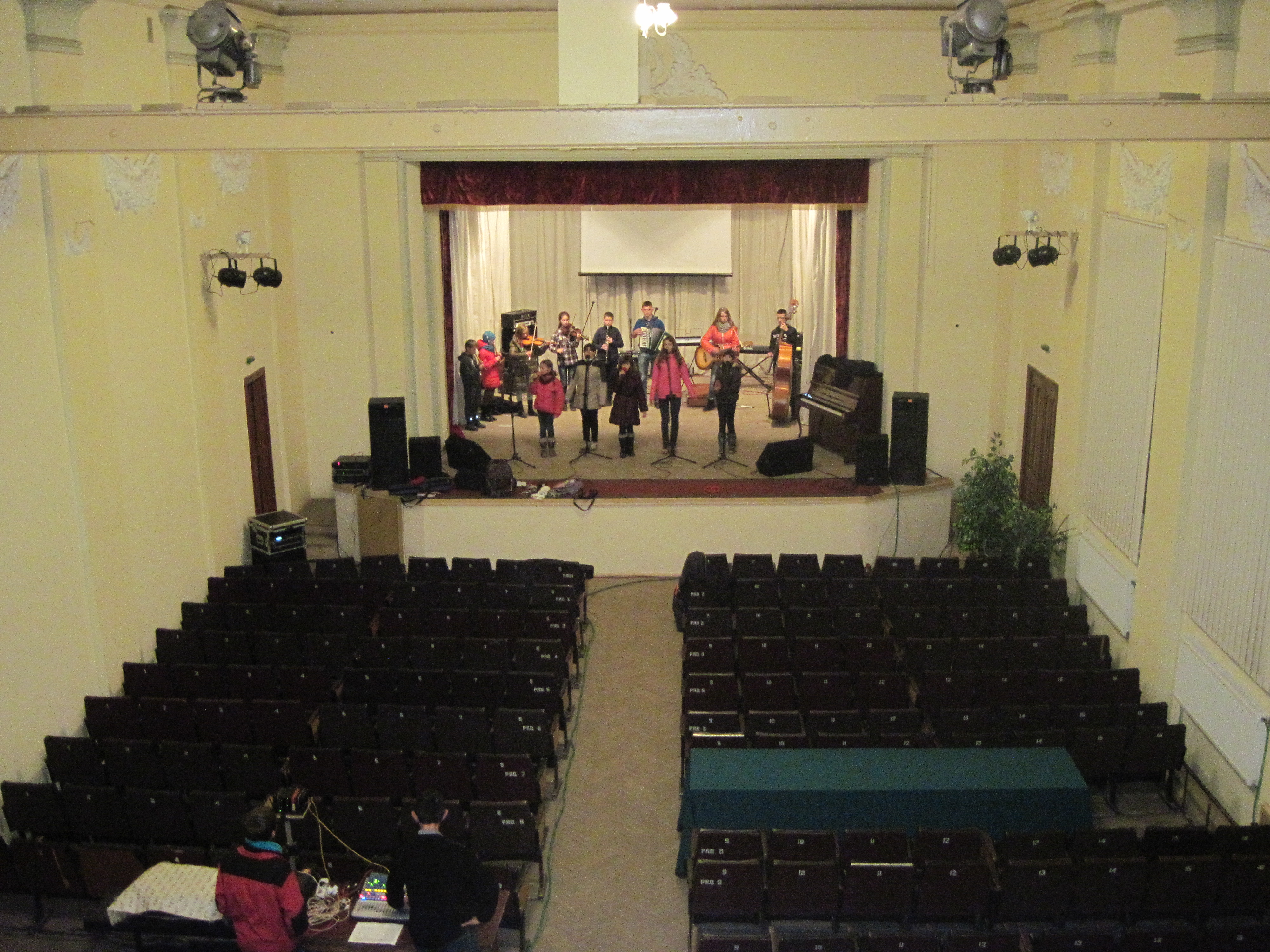 Репетиція в Будинку культури Бучача, осінь 2014